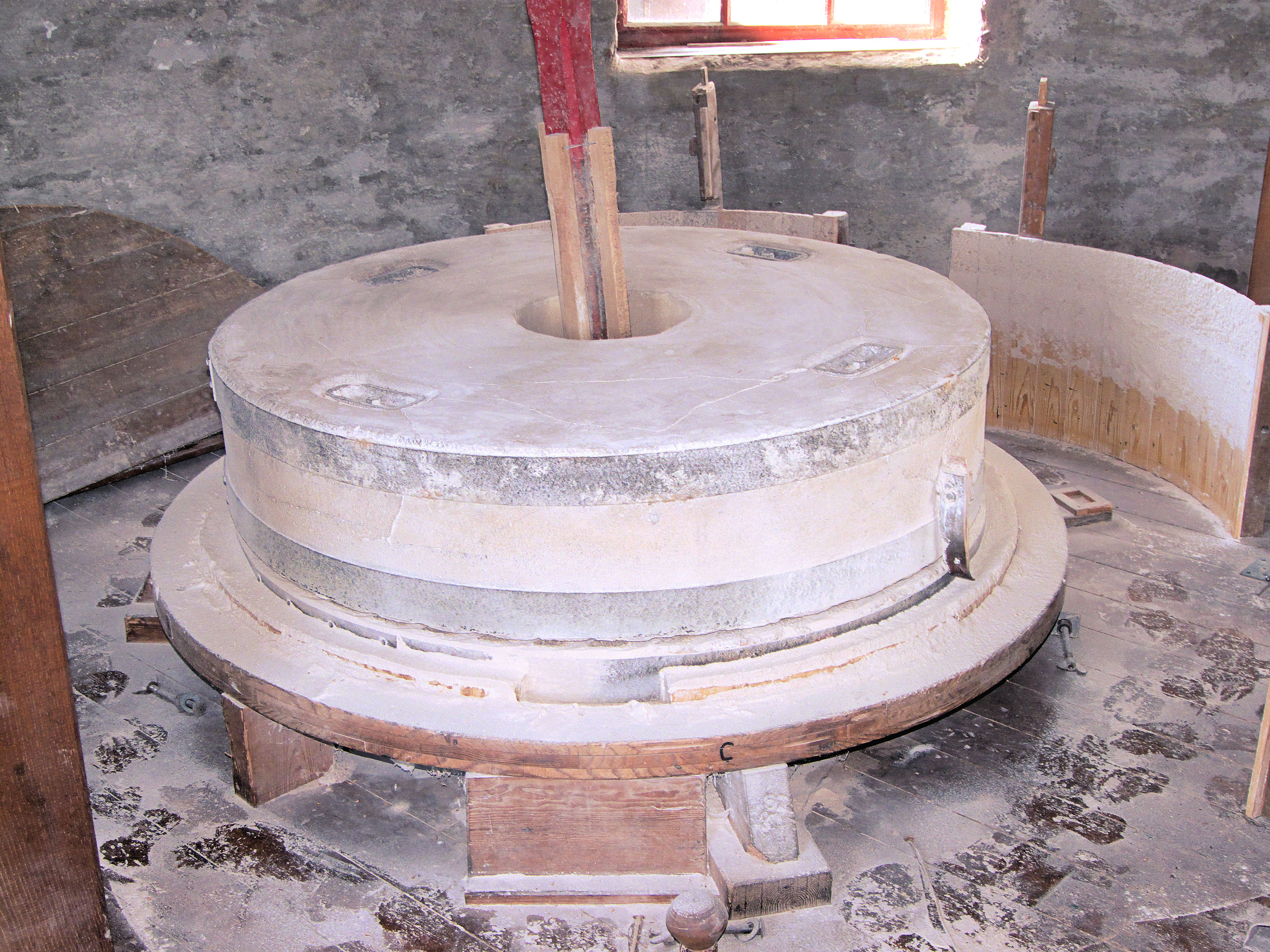 De Hoop Garderen ontmantelde maalstoel met randmeel